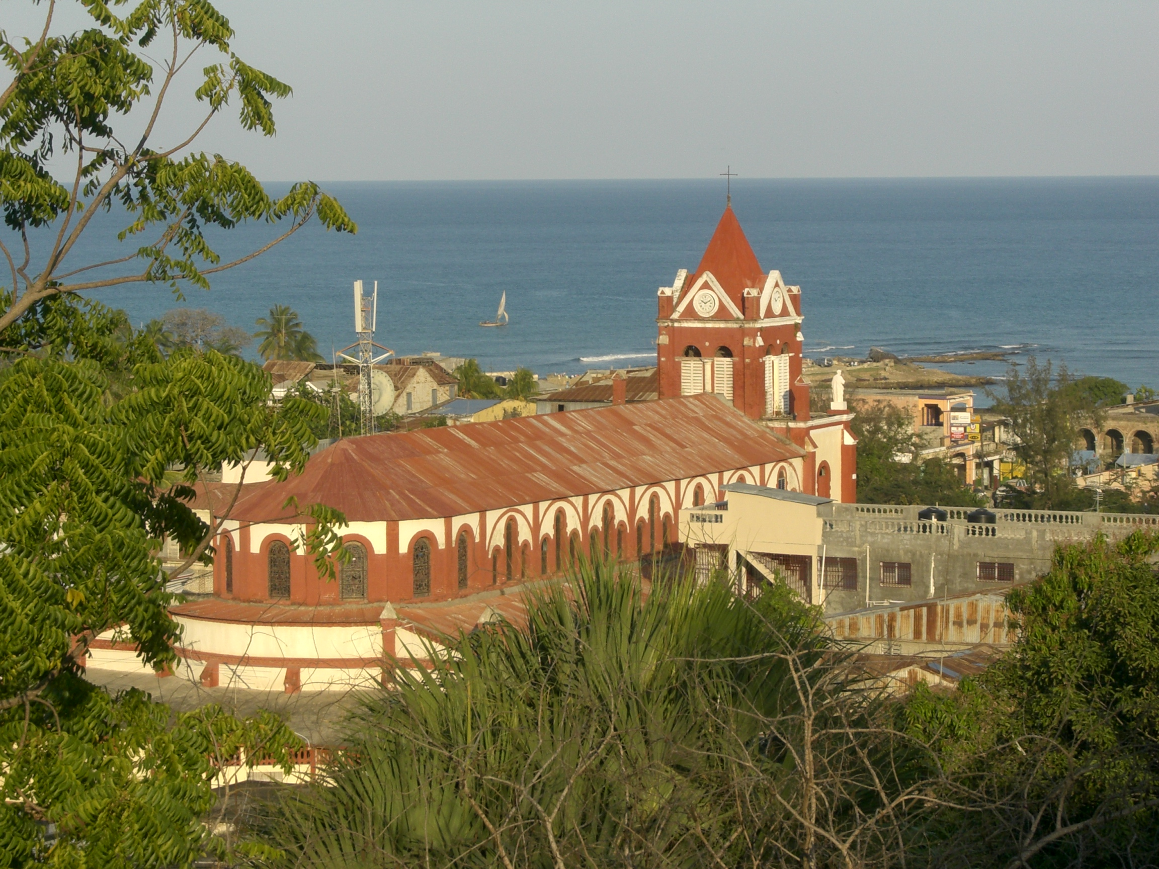 Cathedral, Jérémie, Haiti